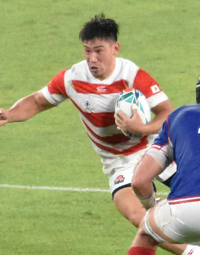 中村 亮土